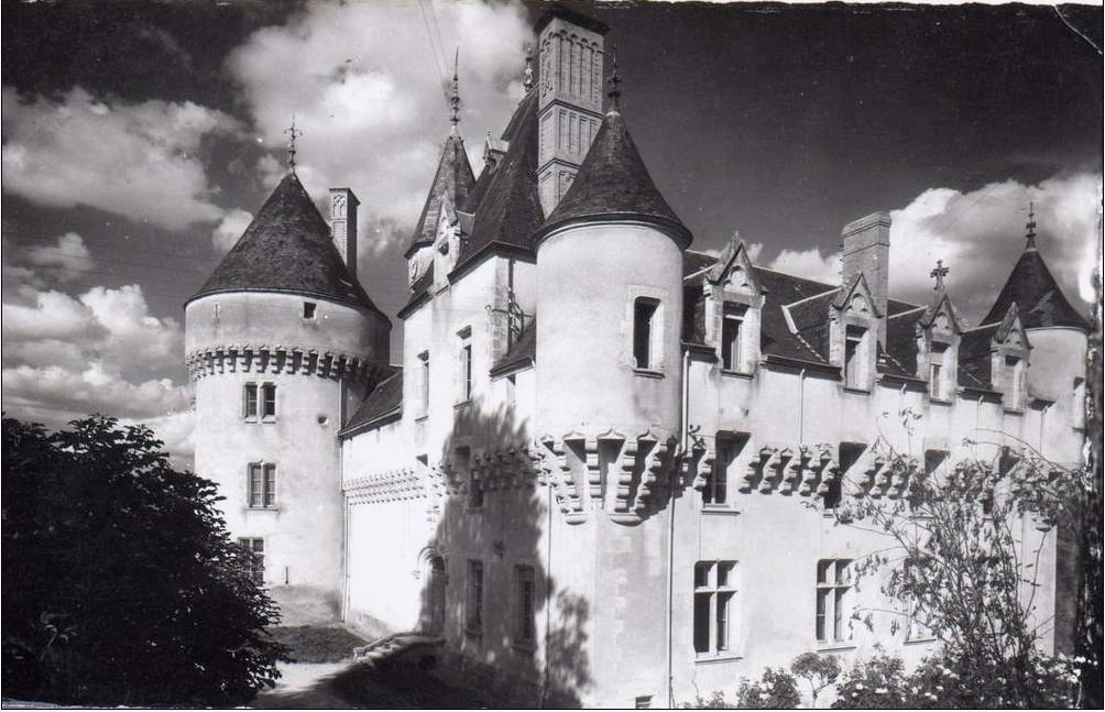 Château de Rouville, Malesherbes, Loiret, Centre, France